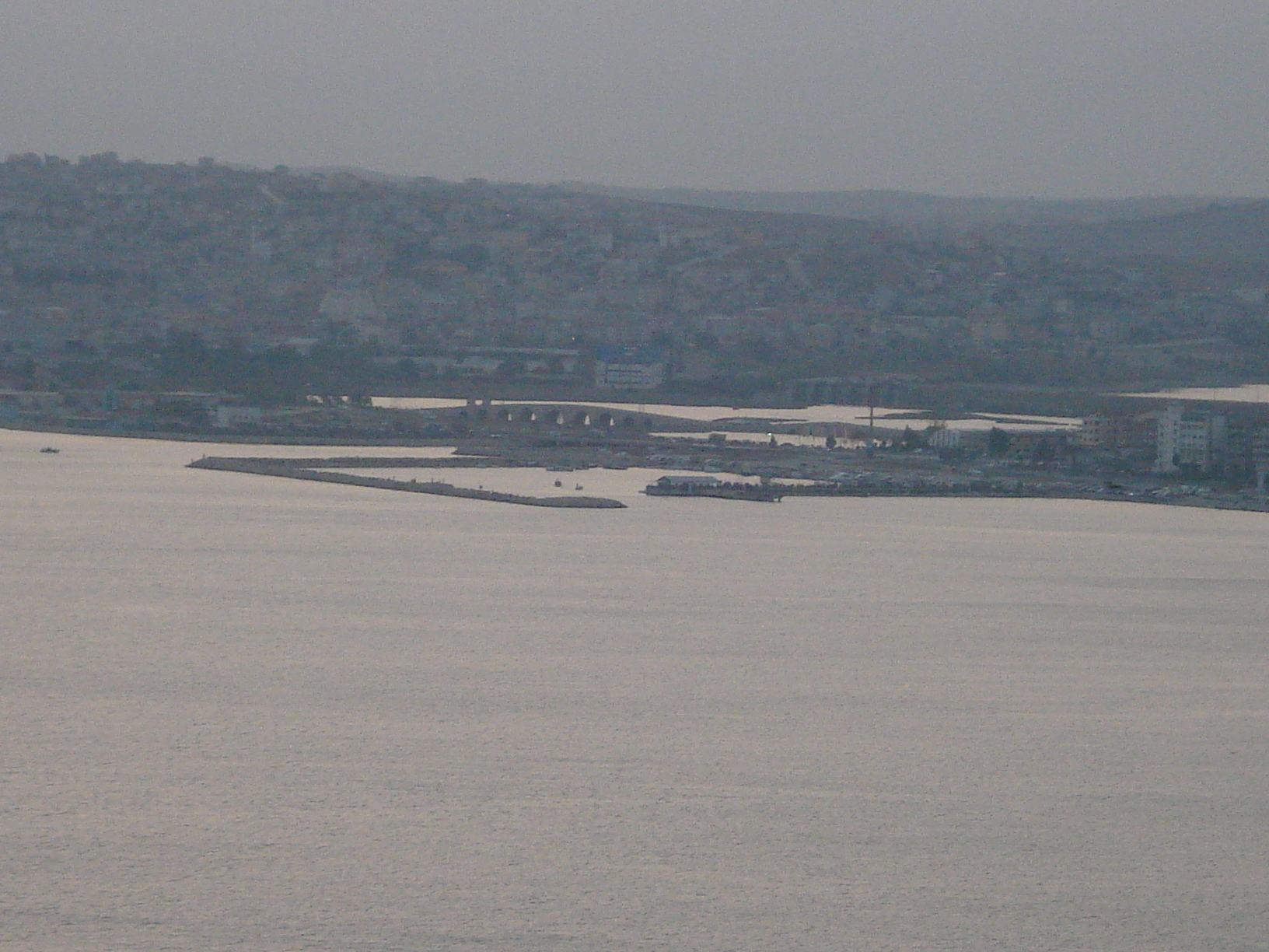 Kanuni Sultan Süleyman Bridge from Gürpınar